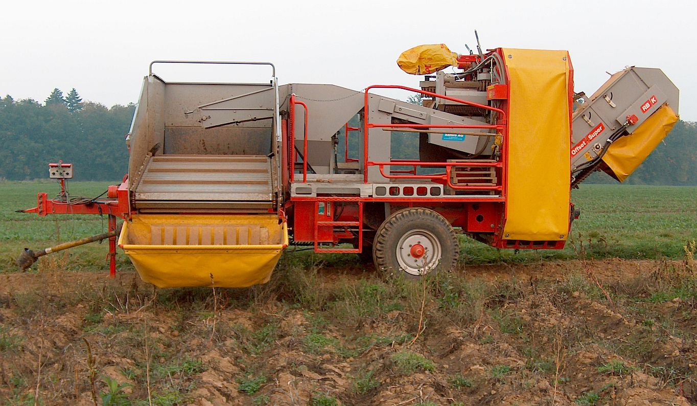 Kartoffelvollernter der Firma Samro